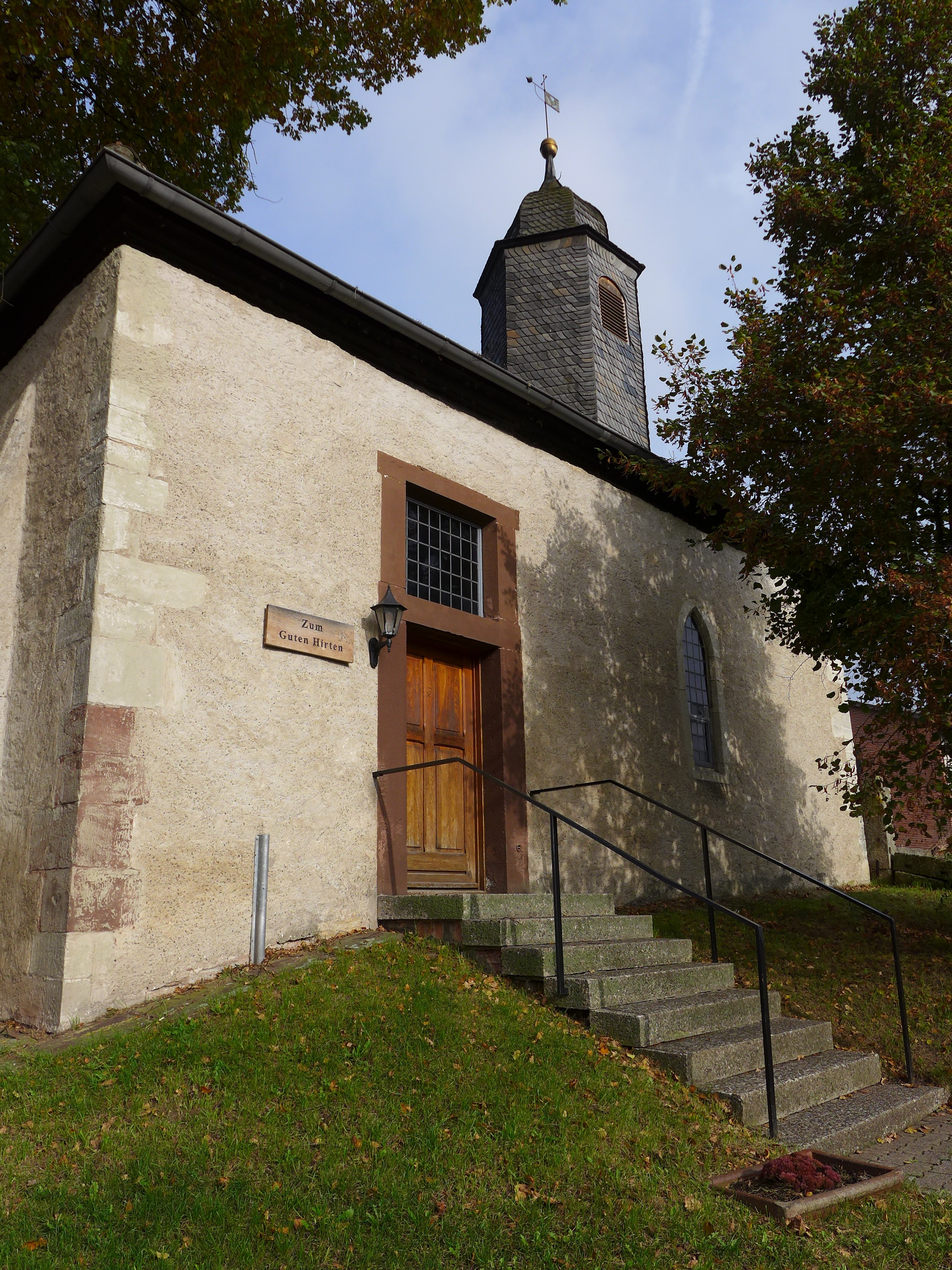 Kapelle - Tür - Treppe